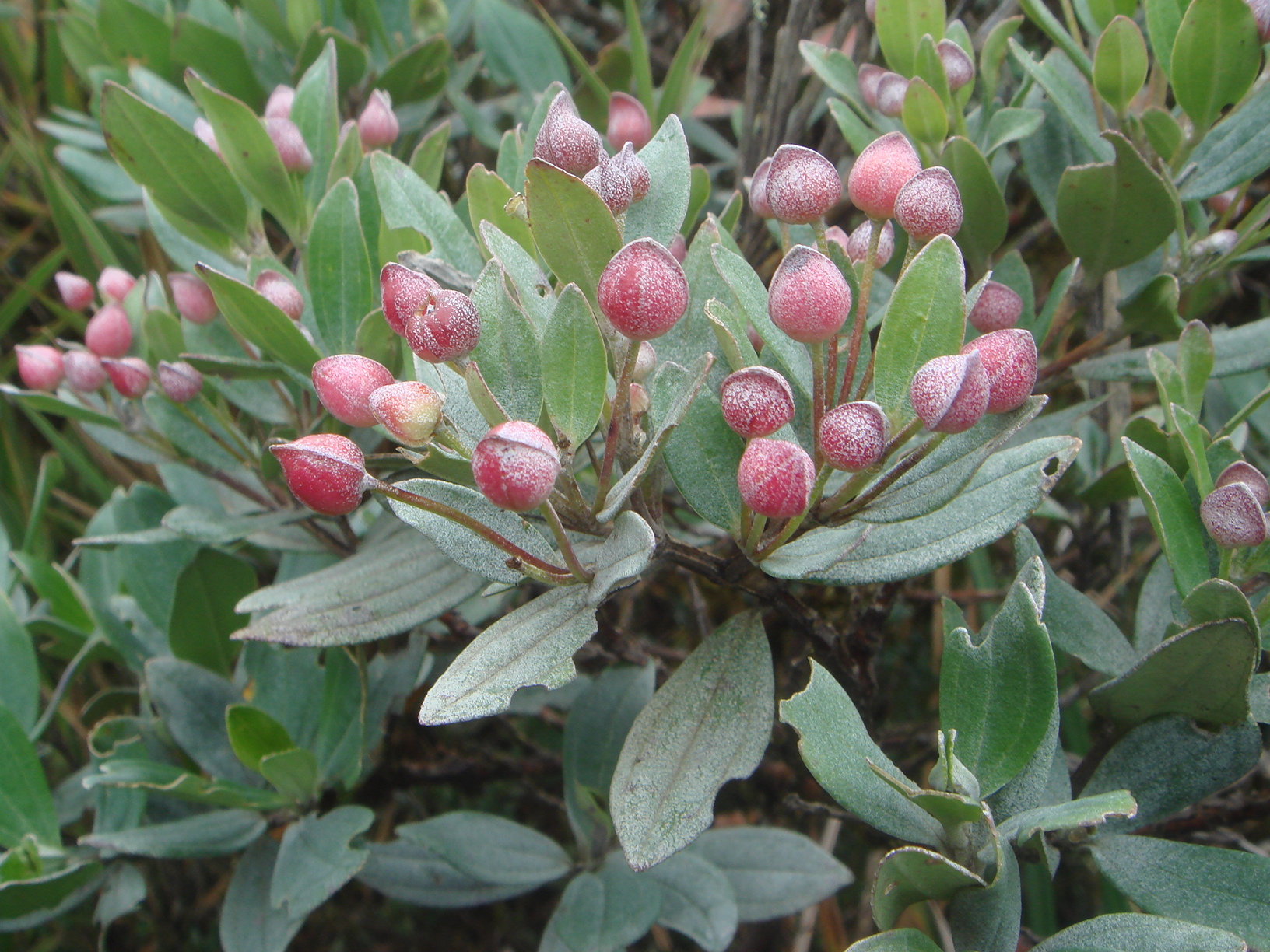 Charne (Bucquetia glutinosa) Páramo de Guasca, Colombia